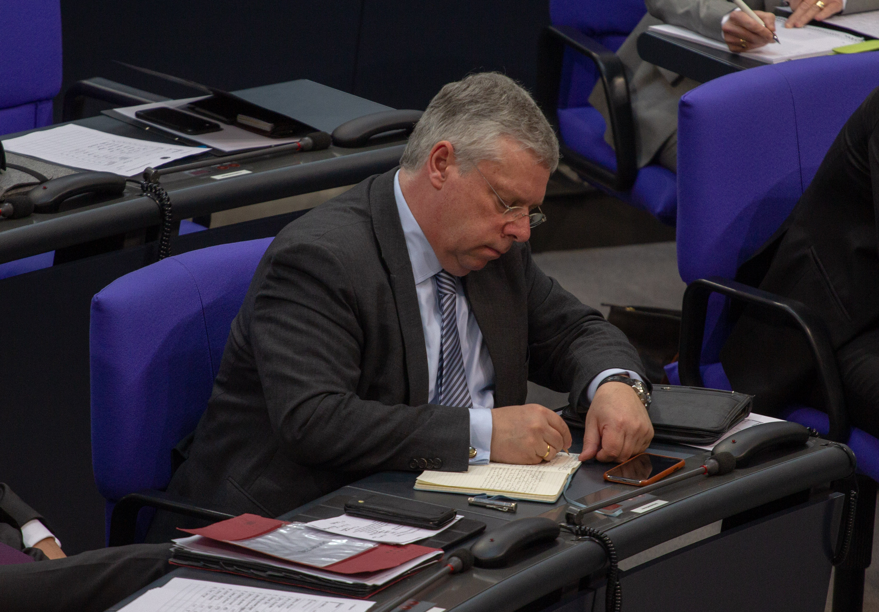 Jürgen Hardt, Mitglied des Deutschen Bundestages, während einer Plenarsitzung am 11. April 2019 in Berlin.